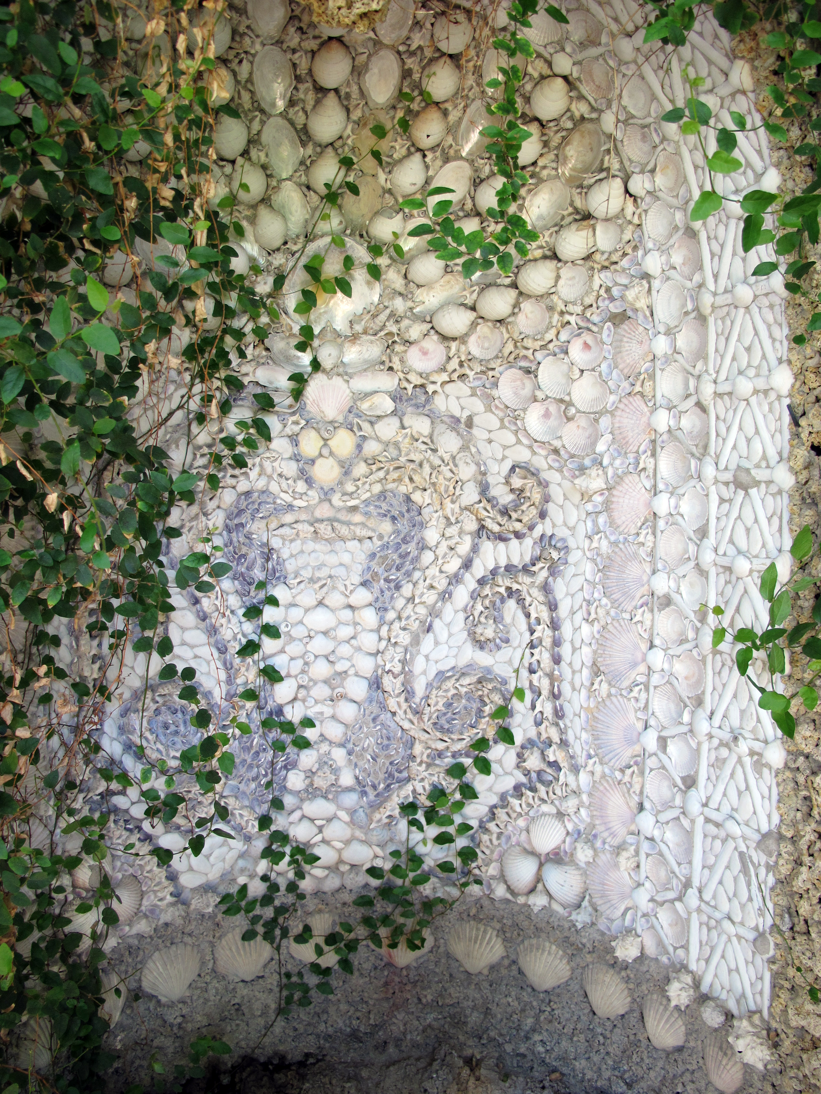 Palazzo budini gattai, interno limonaia, fontanella